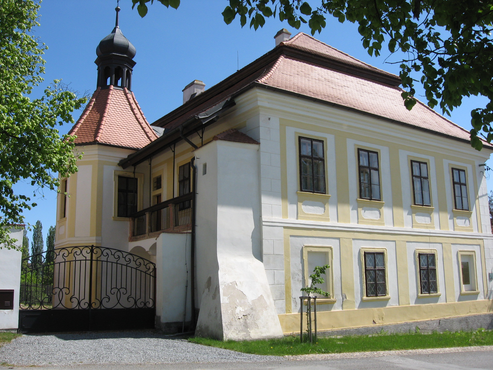 Zámek Bušovice, okr.Rokycany